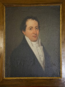 Ritratto di Vittorio Barzoni (1767-1843)